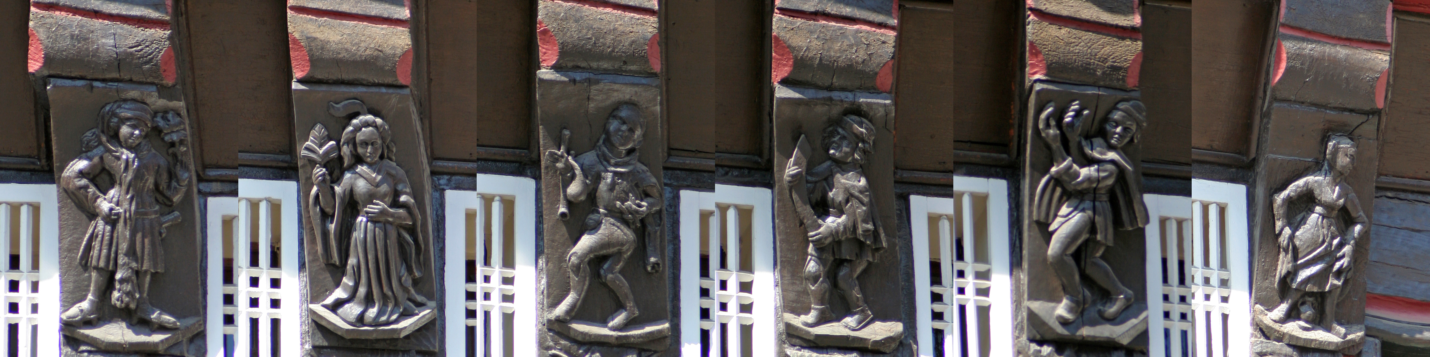 Huneborstelsches Haus in Braunschweig, Details der Fassade